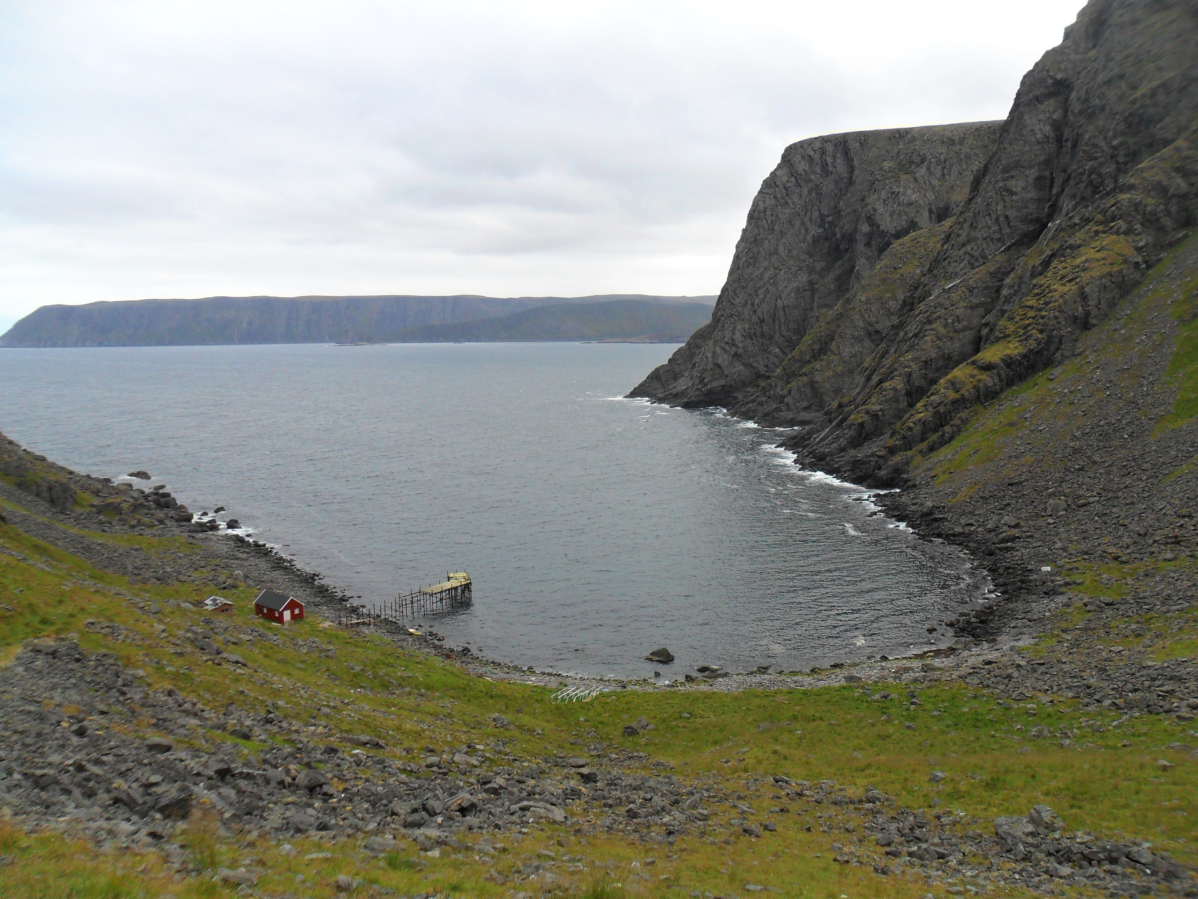 Hornviken